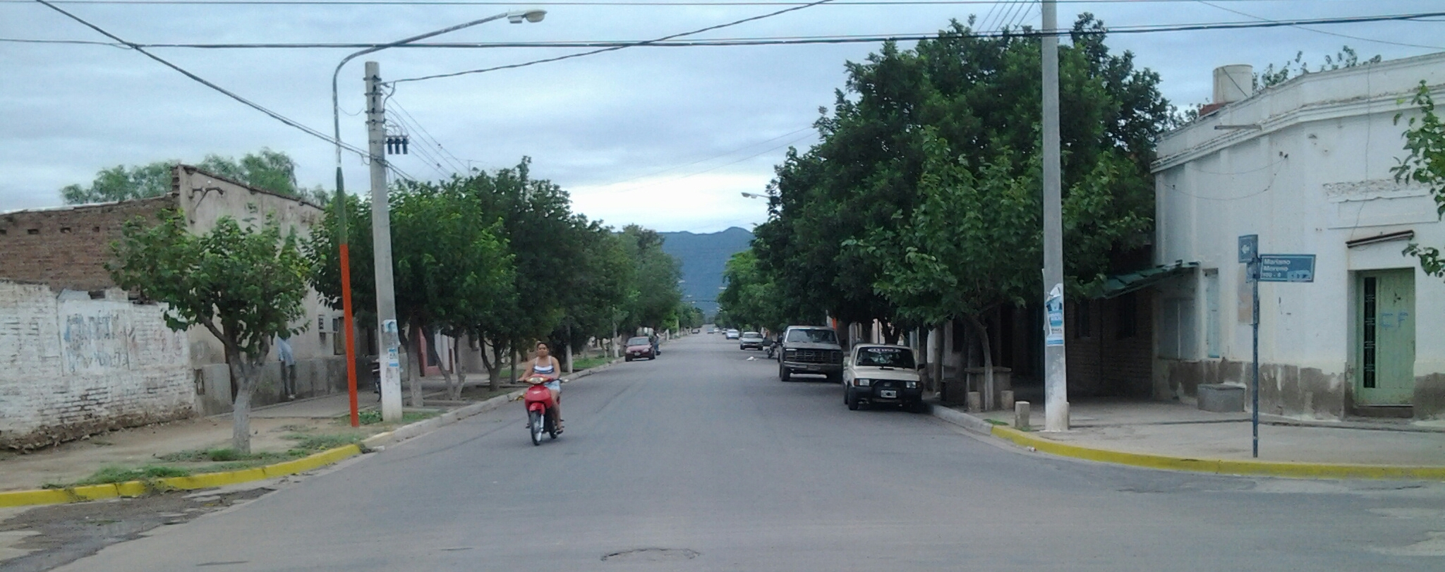 Imagen fotografica de una calle centrica de Chamical, un casco de poblacion en La Rioja, Argentina. La foto fue obtenida un domingo matutino con el cielo encapotado.